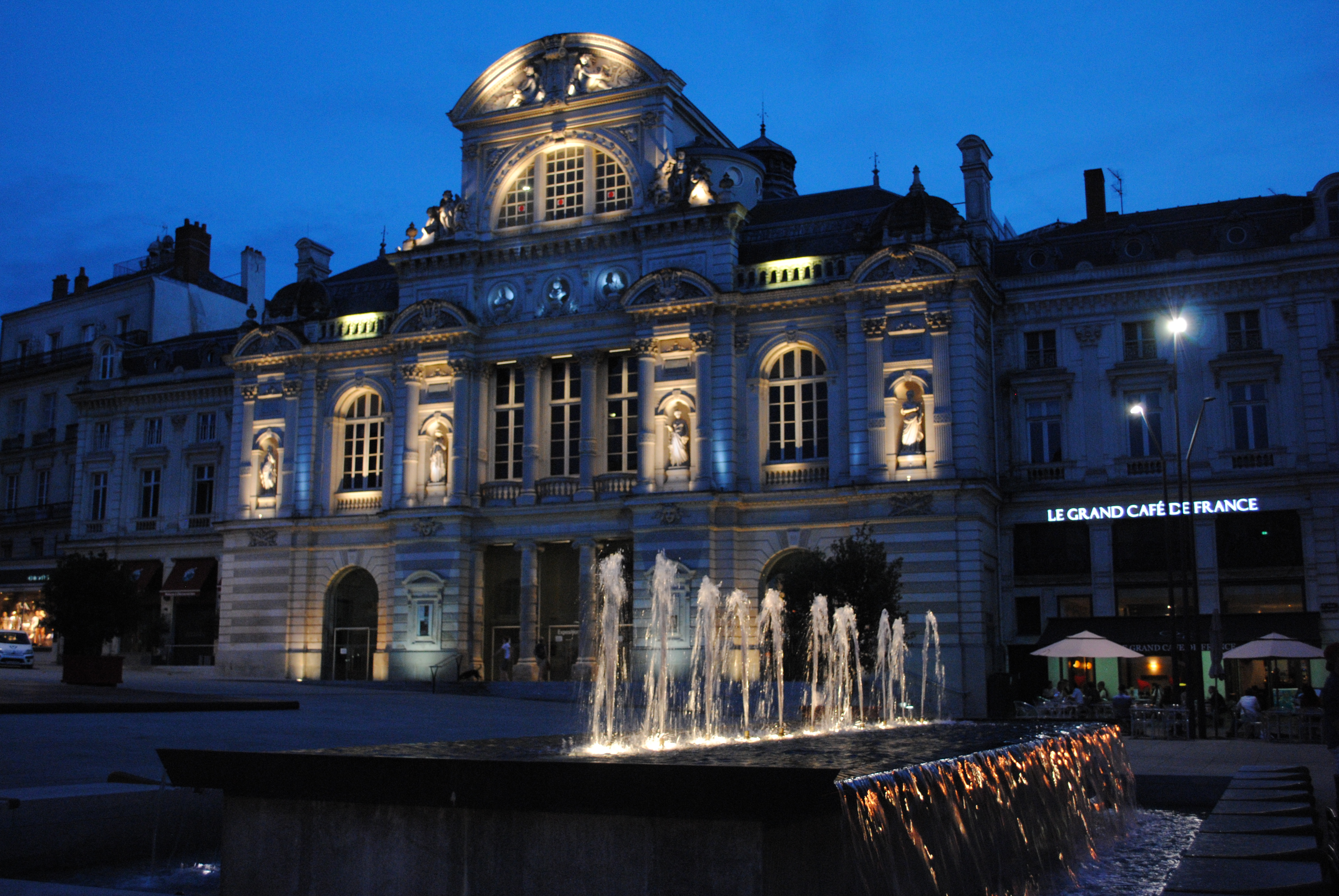 Musée d'Angers